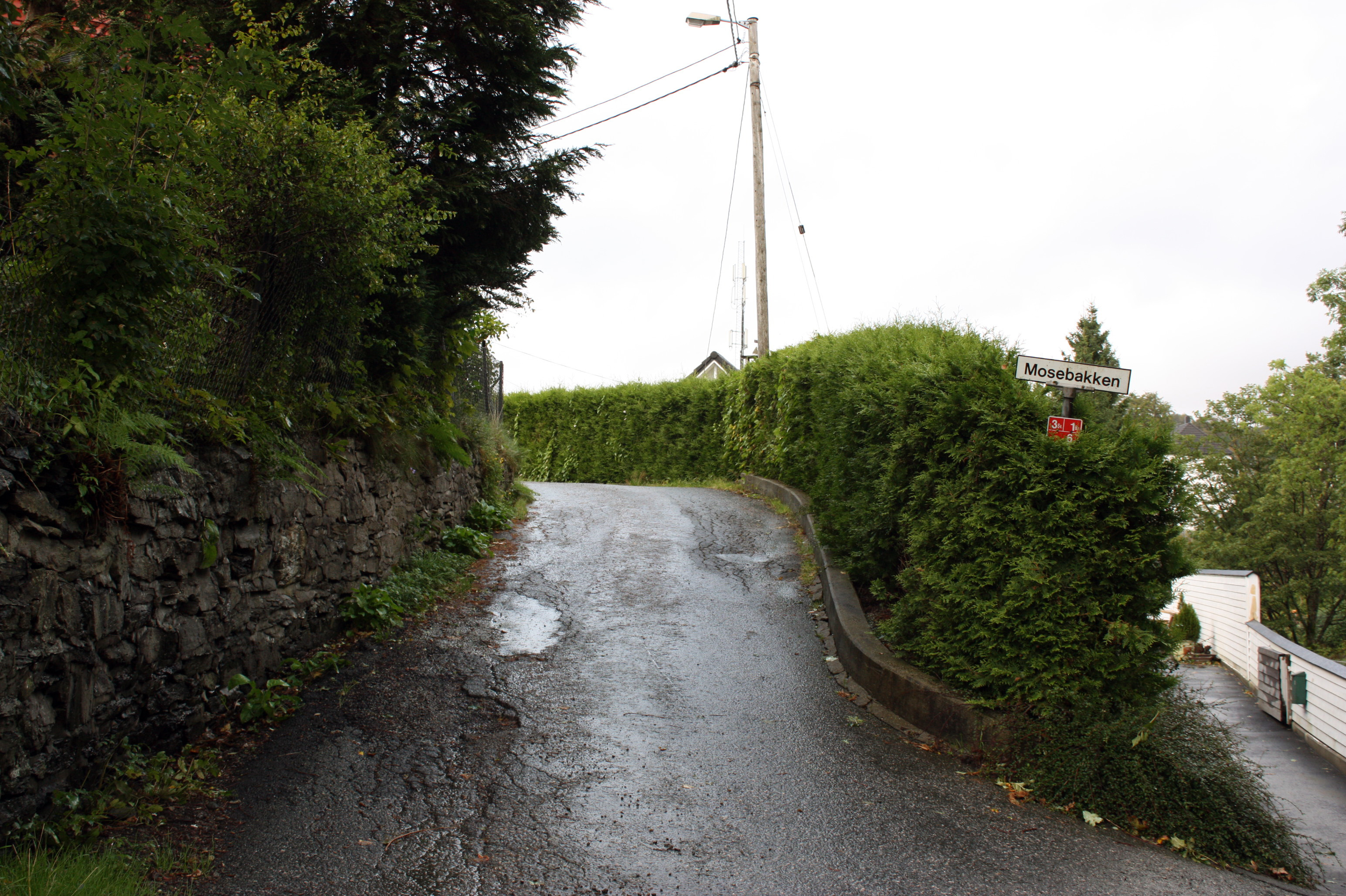 Mosebakken, Fana, Bergen.